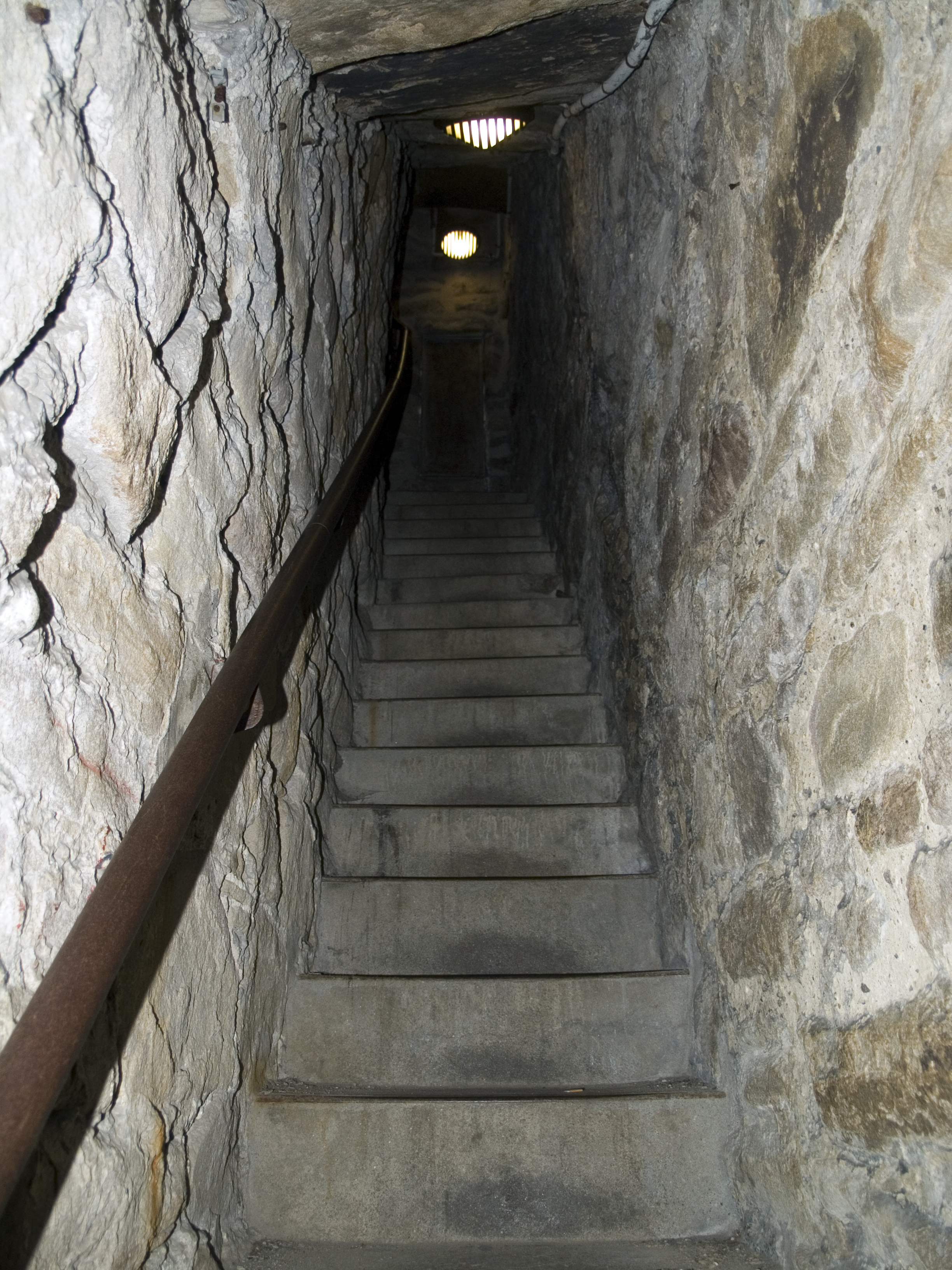 Северный Рейн - Вестфалия, Хаттинген. Замок Бланкенштайн